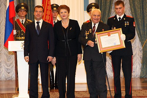 Грамота о присвоении городу Великие Луки почётного звания «Город воинской славы» передана мэру – главе администрации города Лидии Голубевой. Справа – участник Великой Отечественной войны Михаил Хайлов.